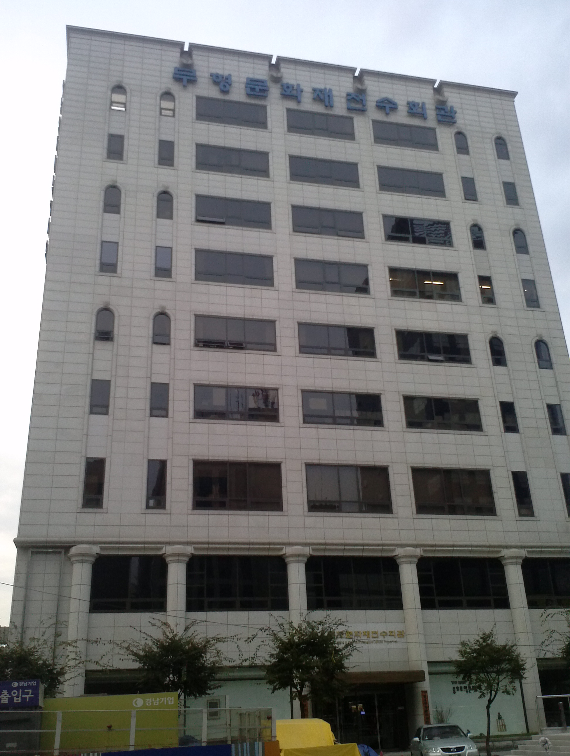 seoul intangible cultural heritage center